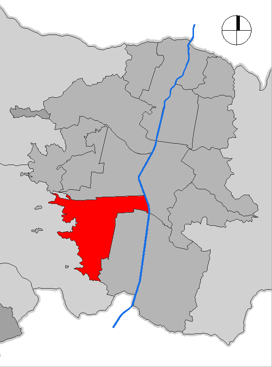 mapa de la comuna Belén. Medellín, Colombia.